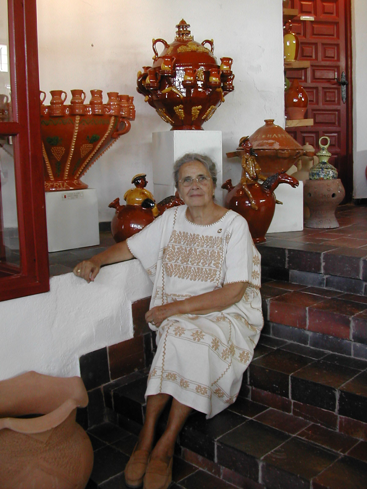 Carmina Useros, fundadora del Museo de Ceramica Nacional, en el museo.